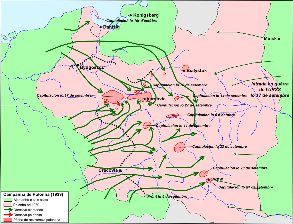 Invasion de Polonha per lei fòrças alemandas e sovieticas en 1939.